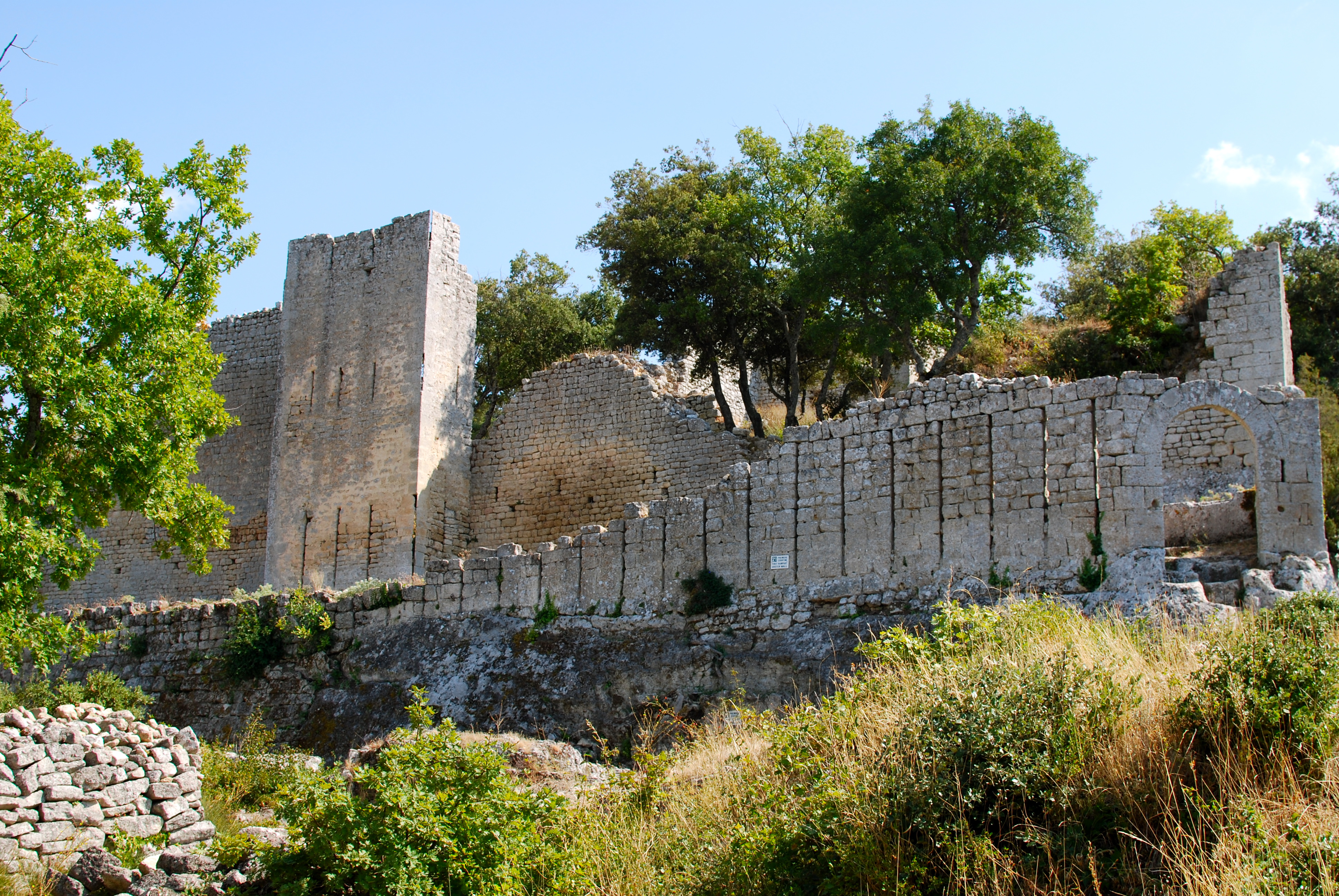 Vue générale du fort de Buoux